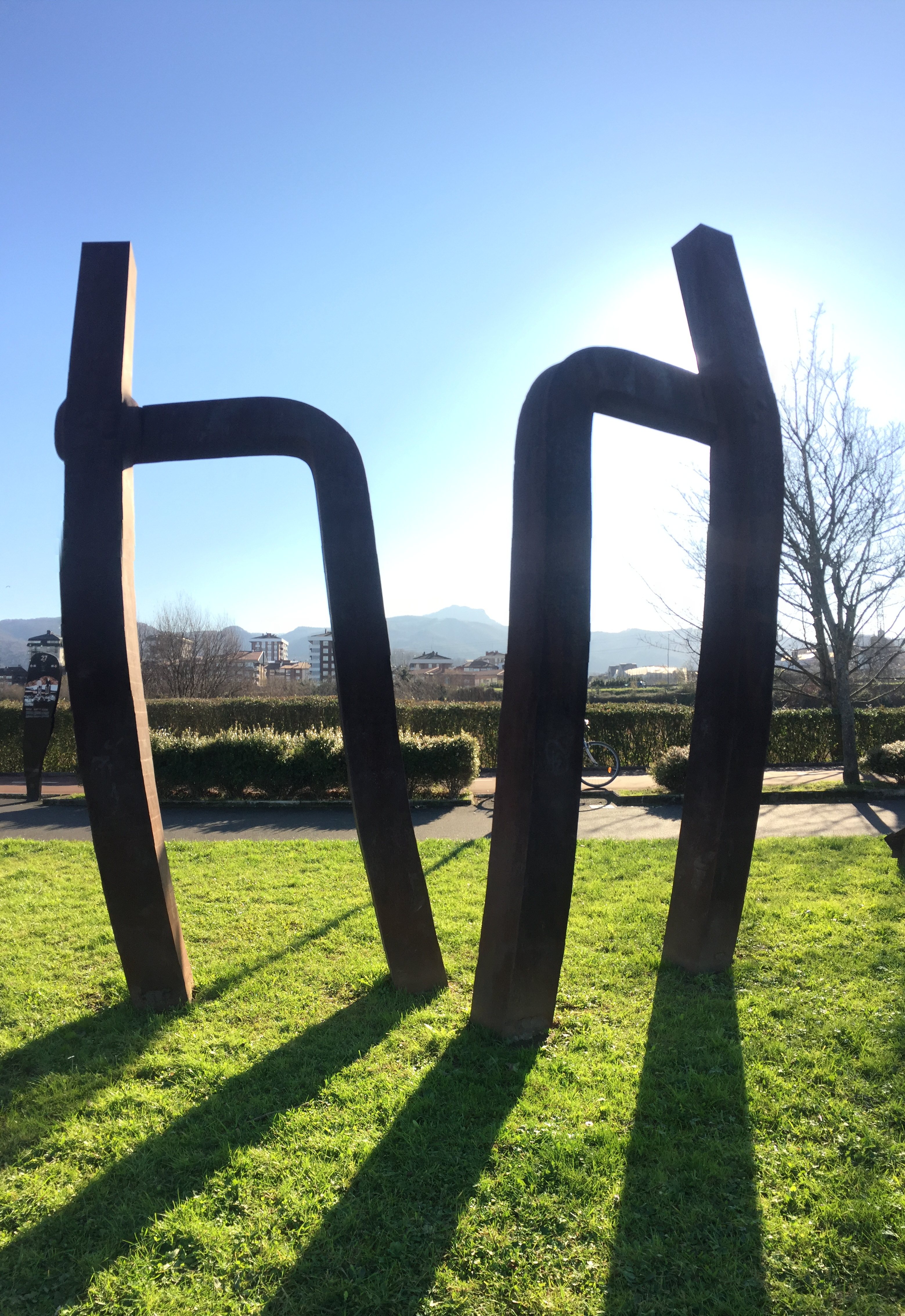 Irungo Eskultura Bidasoa ibaian